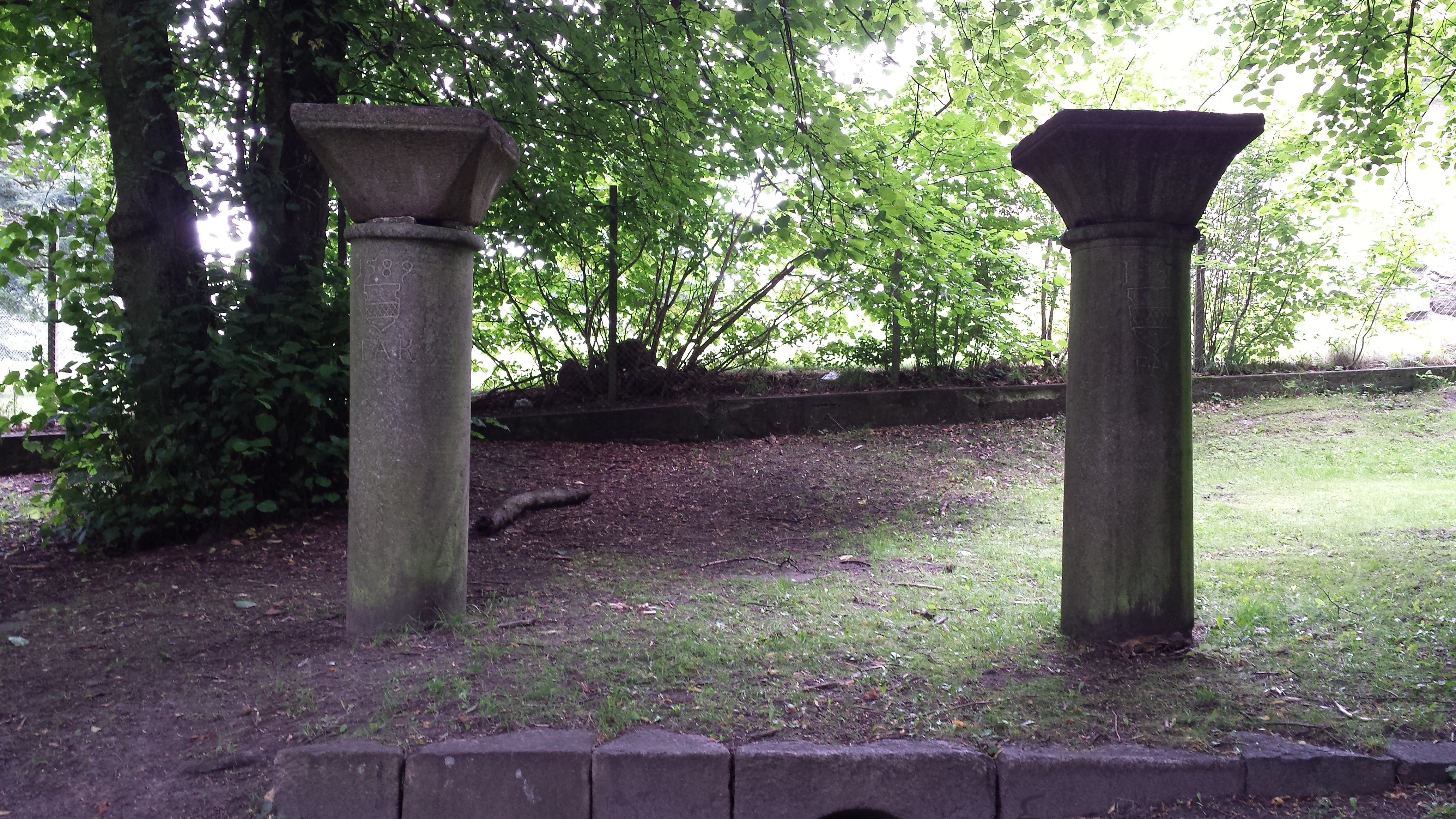 Granitsøjler som nok er fra Essenbæk Kloster, Danmark